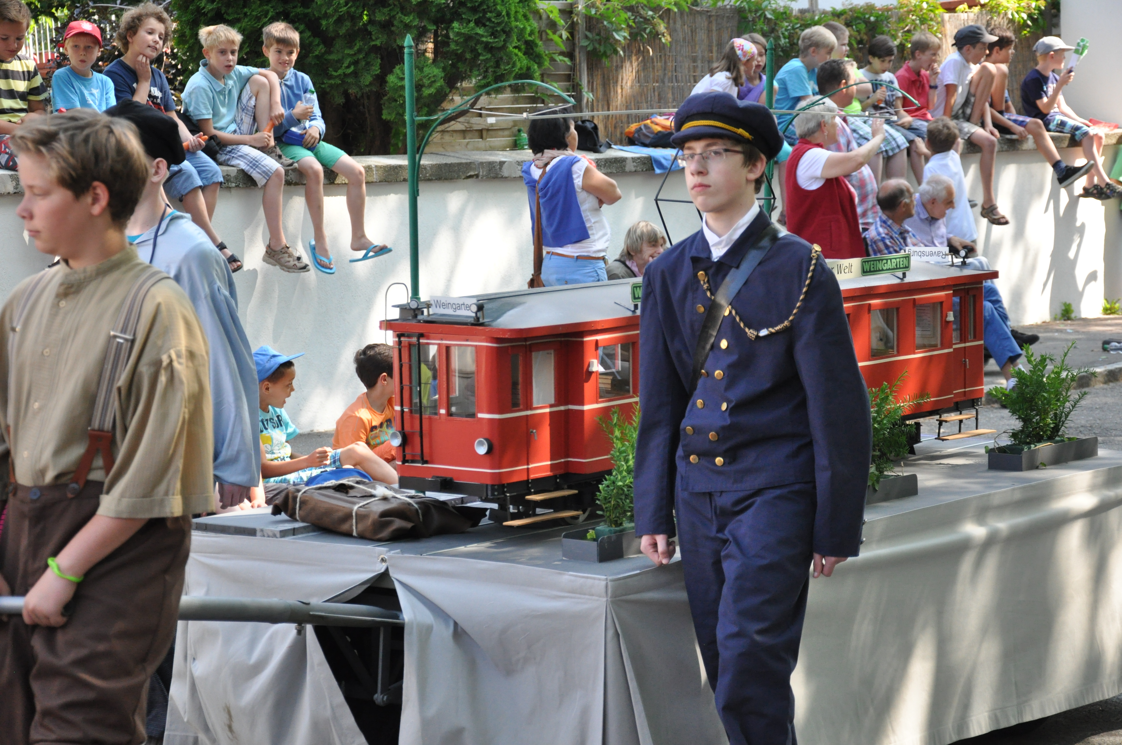 Welfenfest Weingarten, Festzug 2013: Gruppe "Das Bähnle"